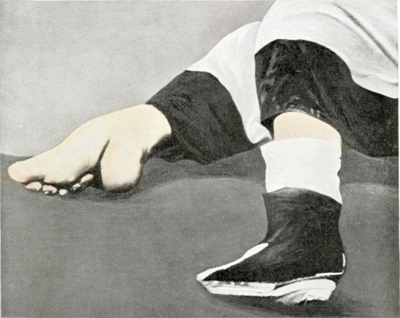 Abb. 668 Die verkrüppelten Füße einer vornehmen Chinesin.